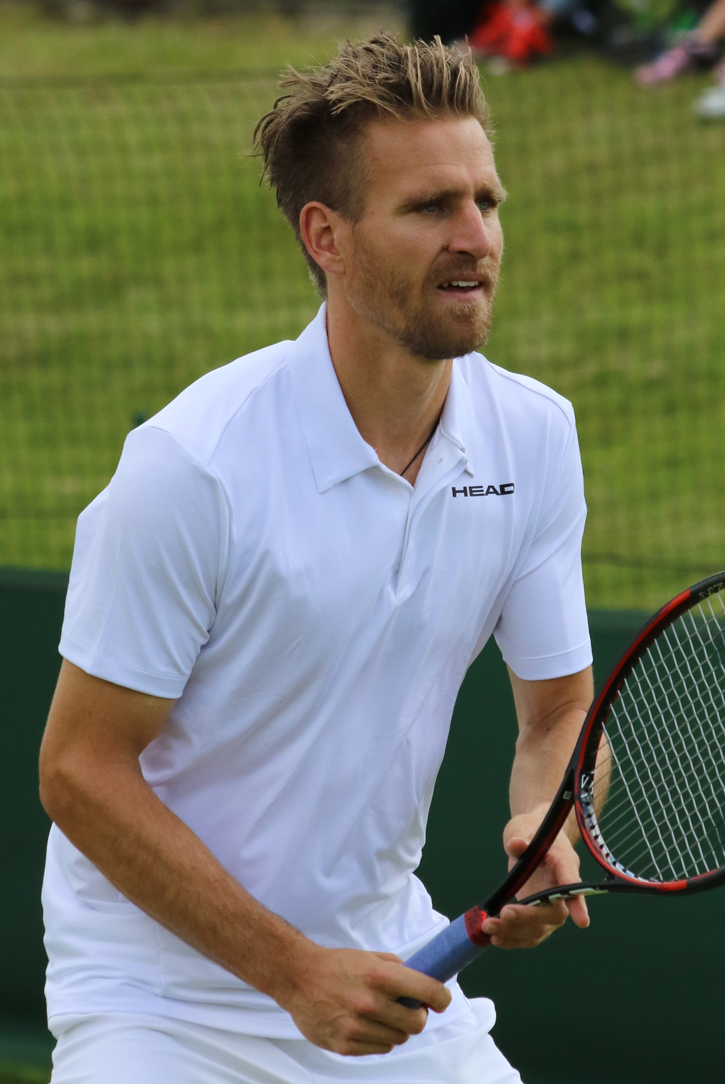 Gojowczyk WMQ16 (2)